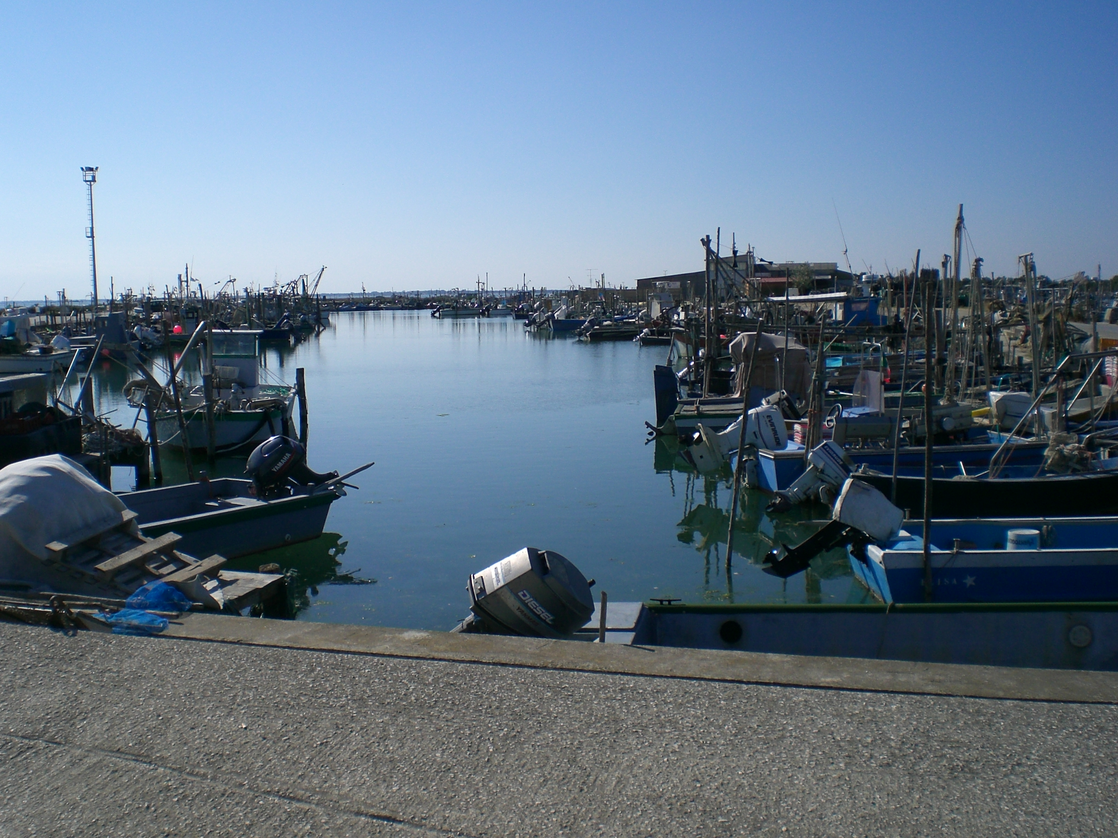 Porto di Gorino